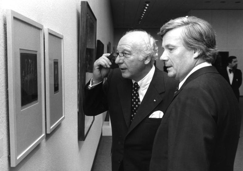 Bundespräsident Walter Scheel besuchte am 14. September 1978 die Nationalgalerie in Berlin (West) und hielt vor der Mitgliederversammlung des Vereins der Freunde der Nationalgalerie eine Ansprache. Im Bild: Der Bundespräsident beim Rundgang in Begleitung des Direktors der Nationalgalerie, Prof. Dr. Dieter Honisch (rechts)